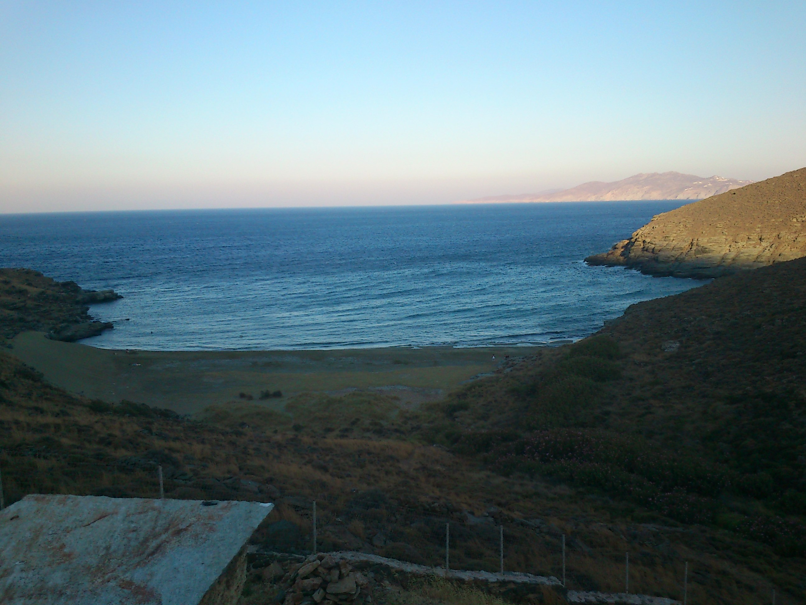 Παραλία "παχιά άμμος" στην Τήνο